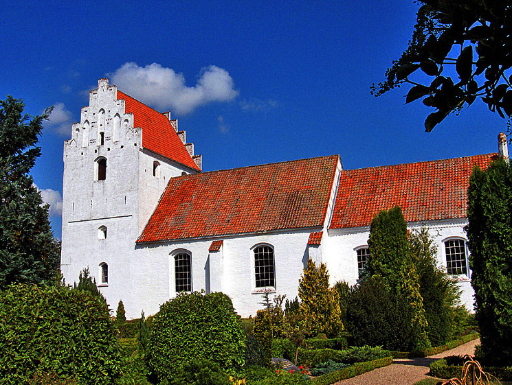 fra syd